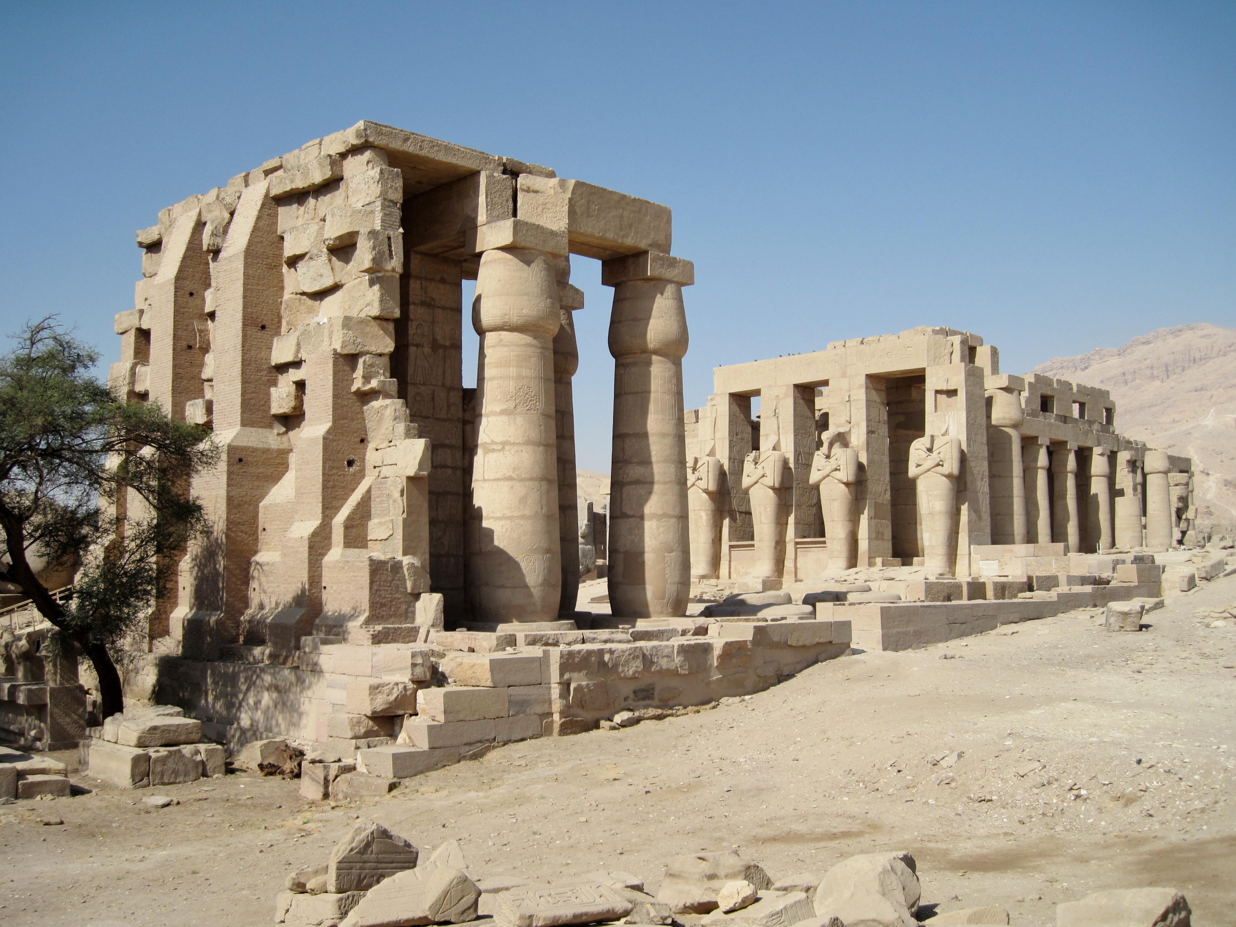 Totentempel des Ramses II. in Theben-West nordwestlich von Luxor, Ägypten